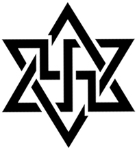 Oficjalny symbol Ruchu Raeliańskiego